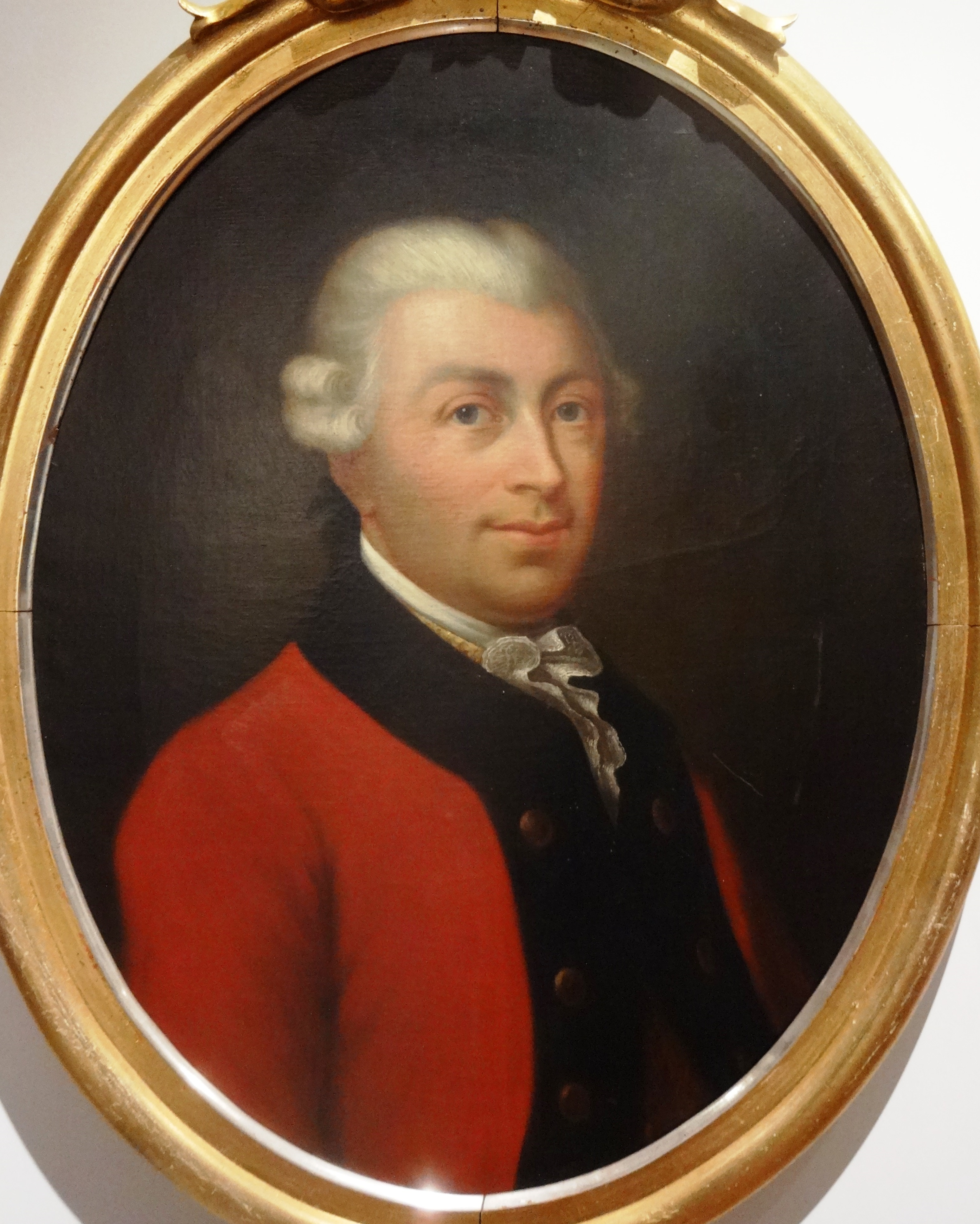 Portrait von Carsten Niebuhr, Dithmarscher Landesmuseum